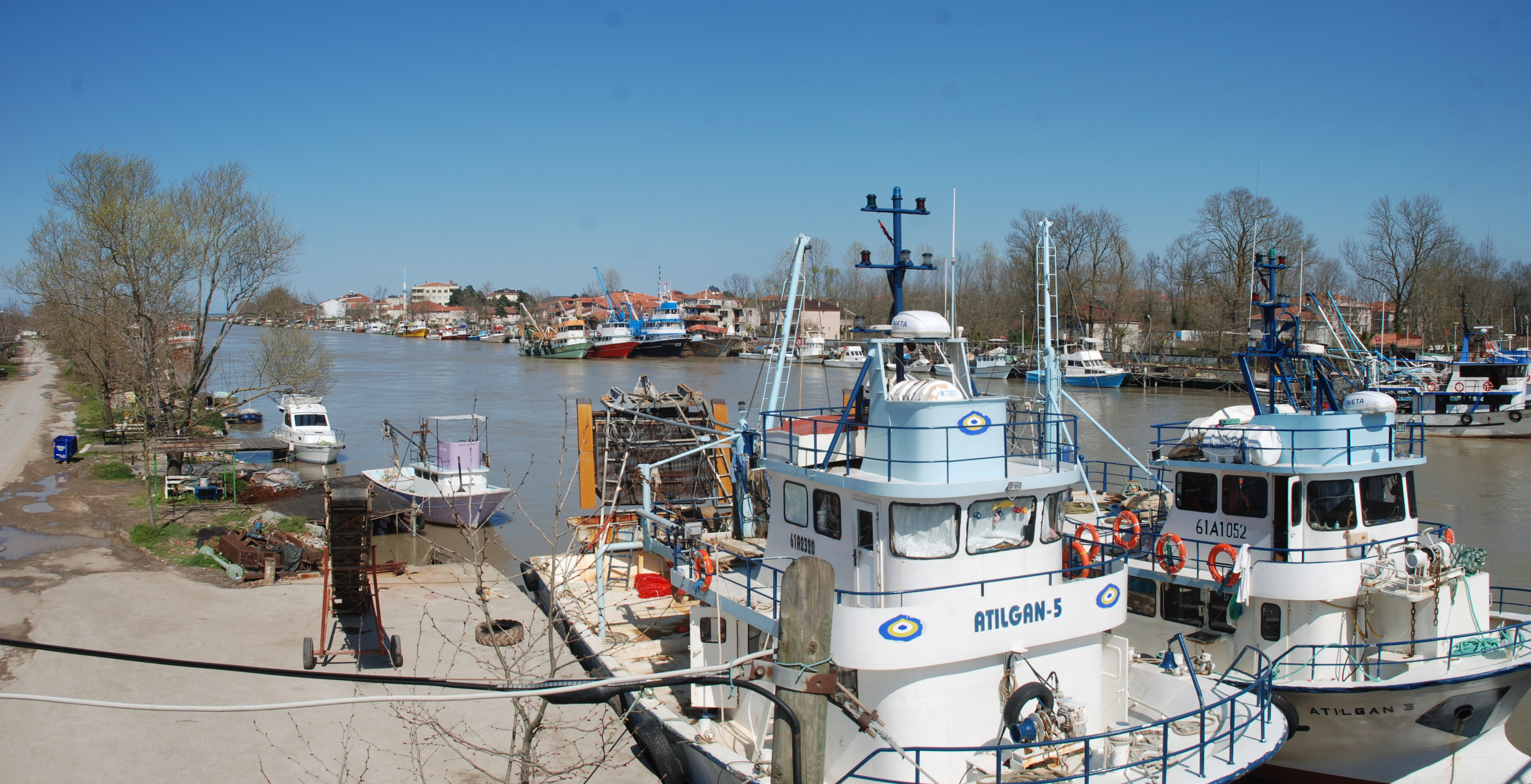 Sakarya Nehri'nin Karadeniz'e döküldüğü Karasu, Yeni Mahalle.